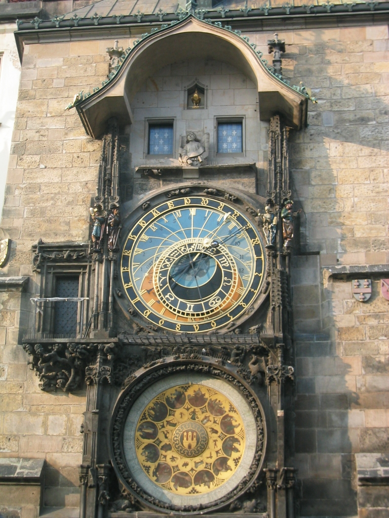 Staromeska radnice z orologem. Orologio del municipio della Città Vecchia di Praga